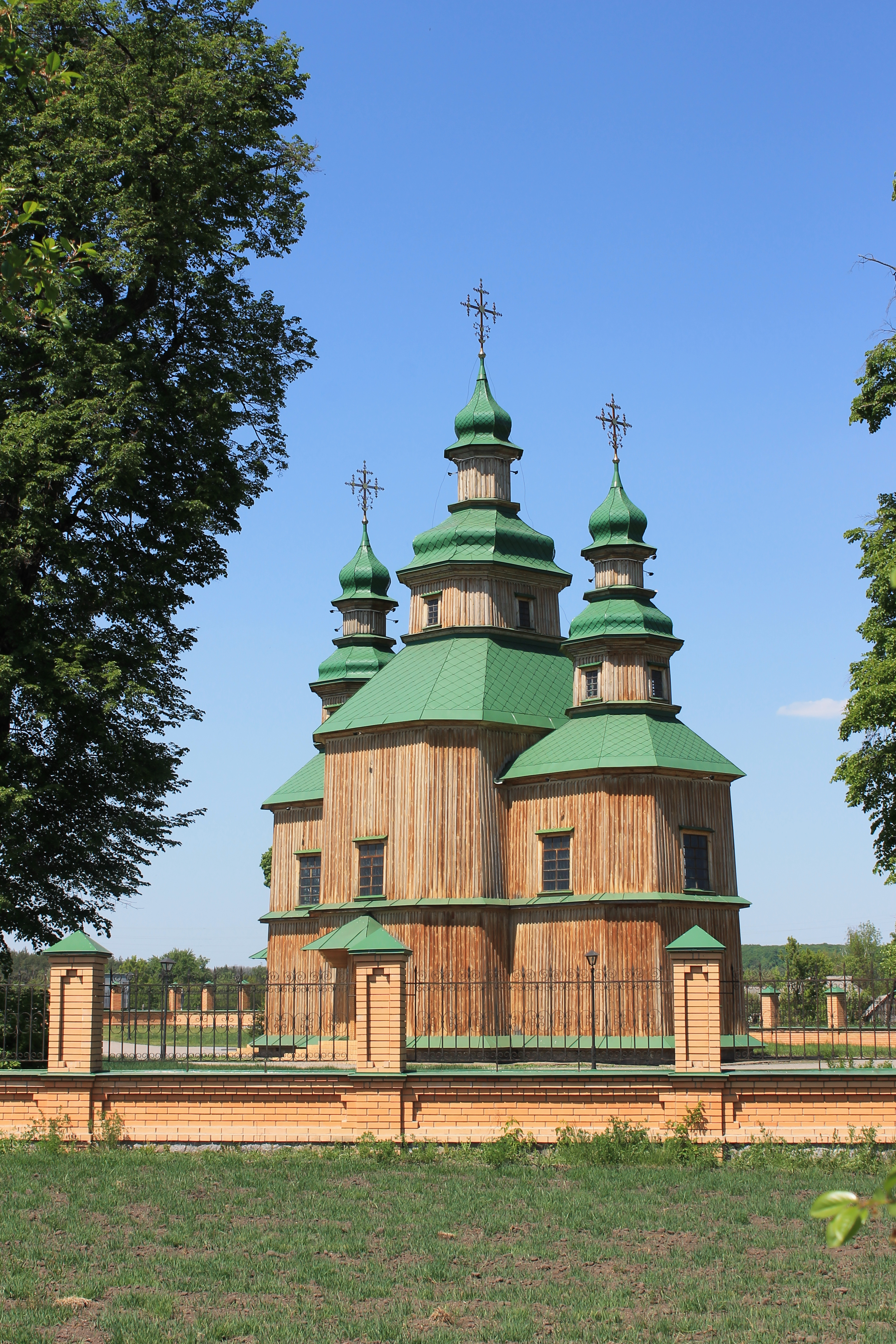 Троїцька церква 1773р. (відбудована), с.Пустовійтівка, Роменський р-н., Сумська обл.